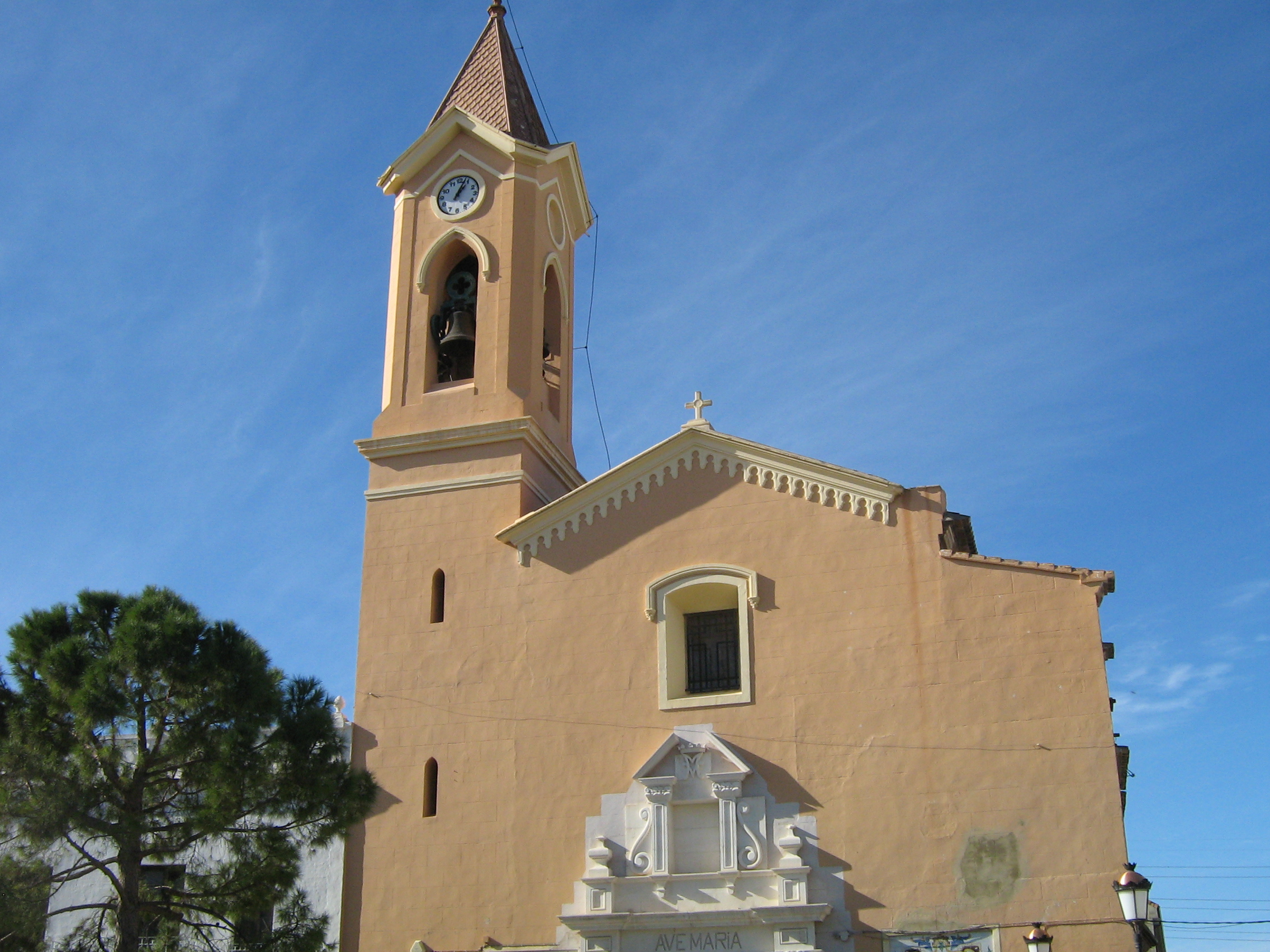 Parroquia de Benetússer